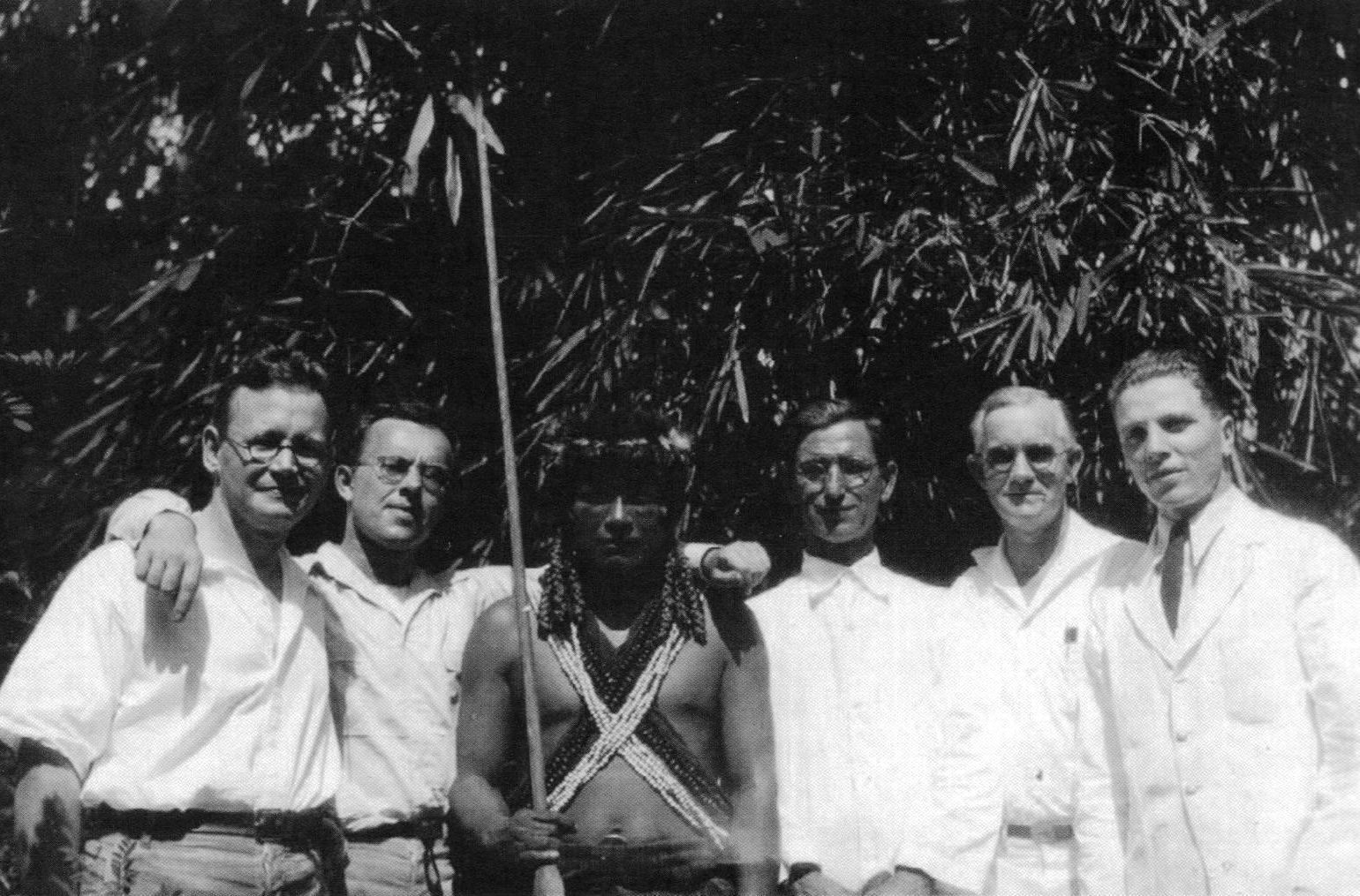 Graña junto a Mariano el Brujo y un grupo de técnicos occidentales